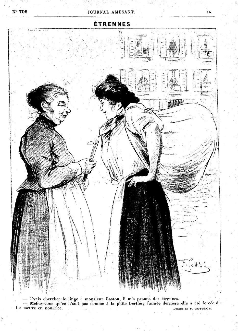 Dessin montrant des blanchisseuses.